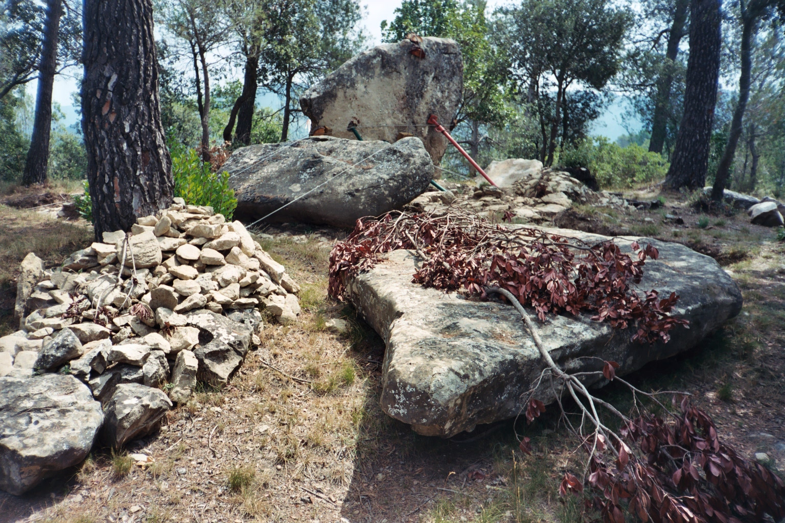 El Dolmen de Trullars, pocs dies abans de l'incendi del 2003 (Monistrol de Calders, Moianès)